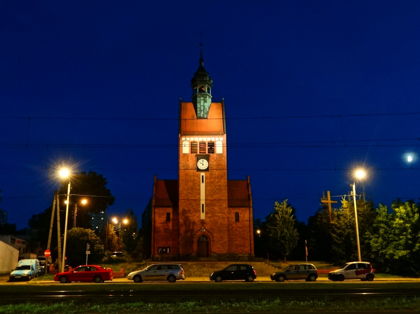 Kościół św. Józefa Rzemieślnika w Bydgoszczy, zbud. 1906 r., do 1945 r. ewangelicki